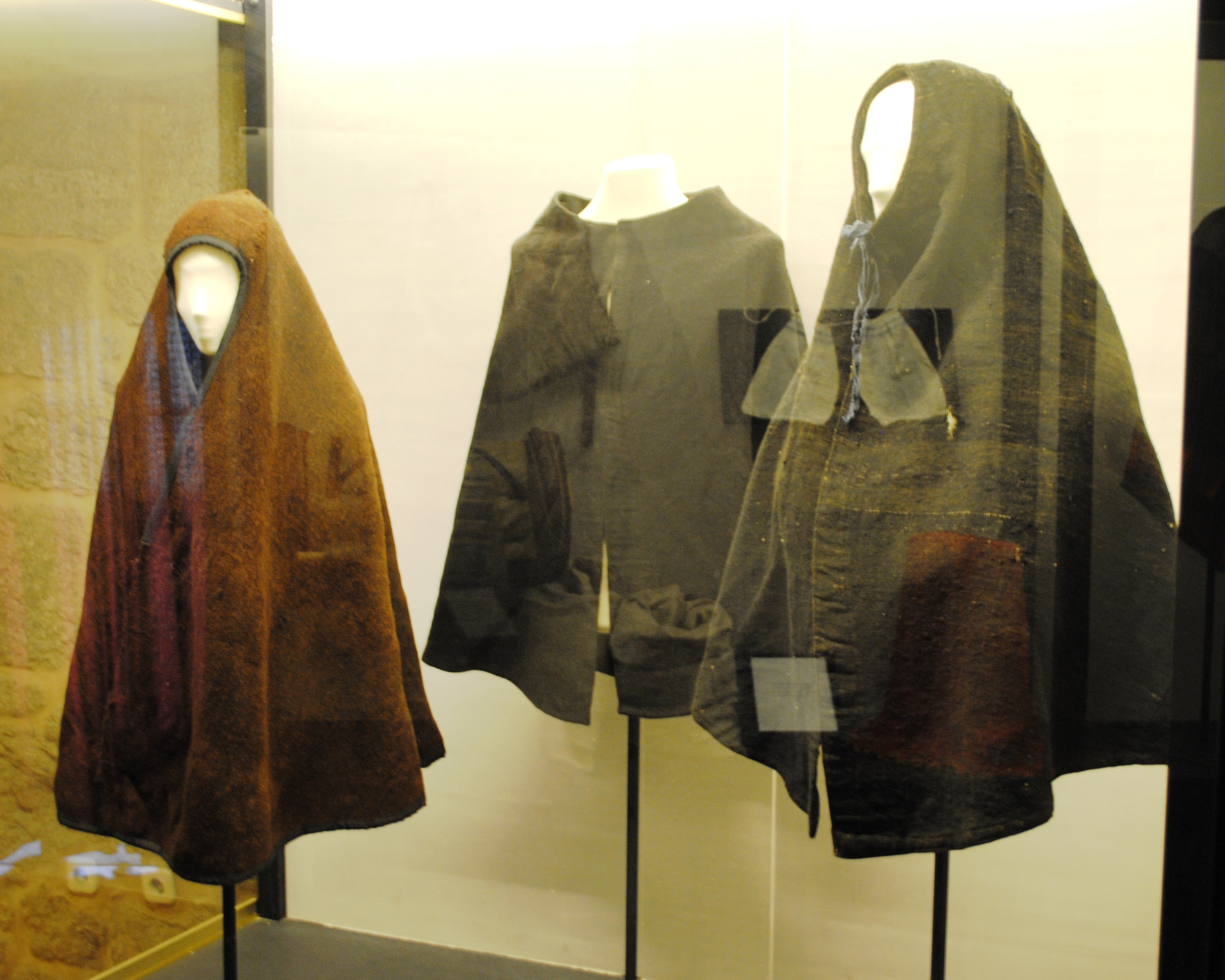 Capa, capotillo, muradanas, prendas de abrigo, liño e la abatanados, Comarca da Limia, Xurés e parte da provincia ourensá